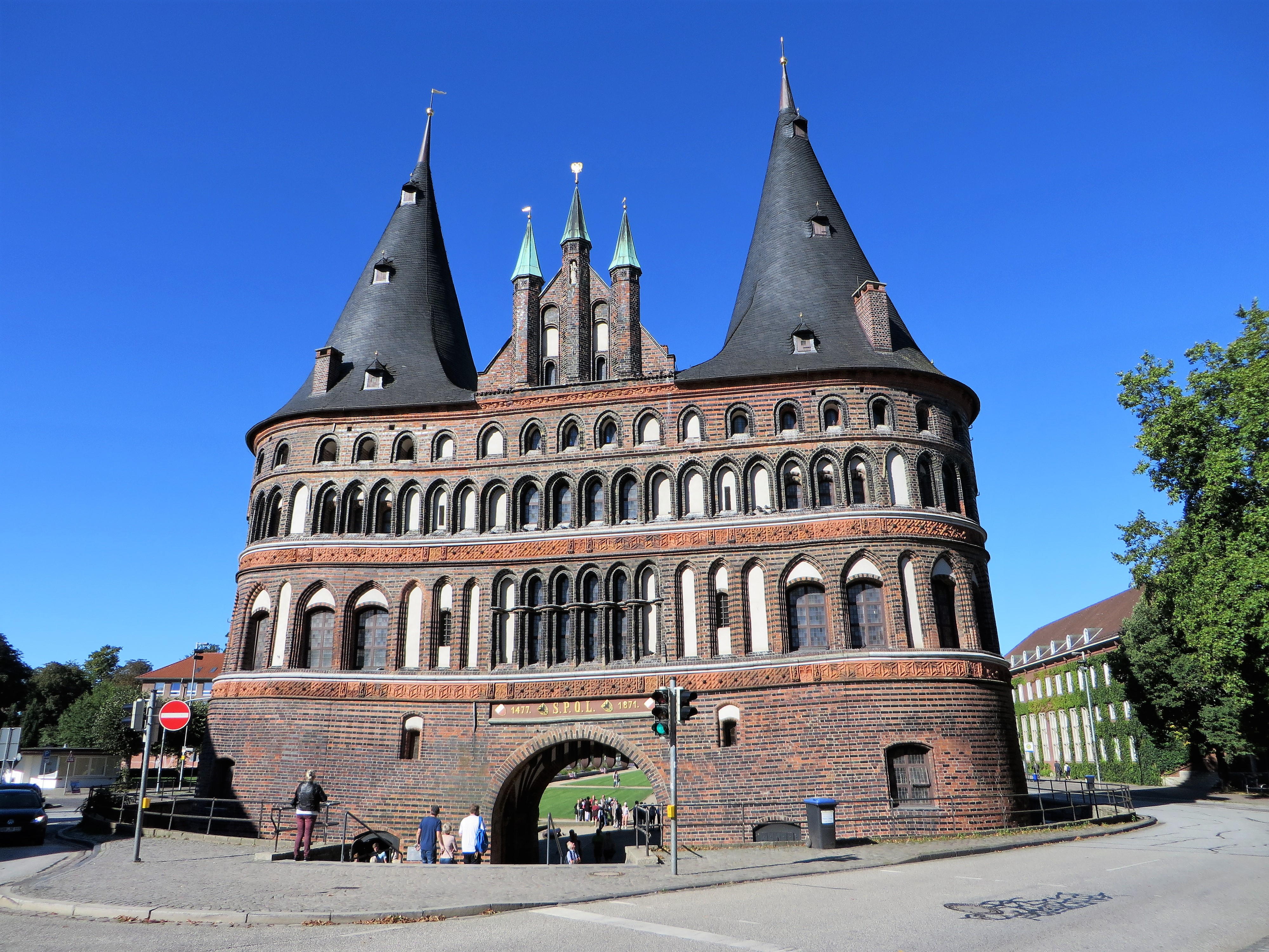 Blick auf das Holstentor (Stadtseite) in Lübeck. Das 1464–1478 von Hinrich Helmstede erbaute weltberühmte Wahrzeichen der Stadt war einst nur eines von mehreren gestaffelten Stadttoren, die die Westseite der Trave sicherten.